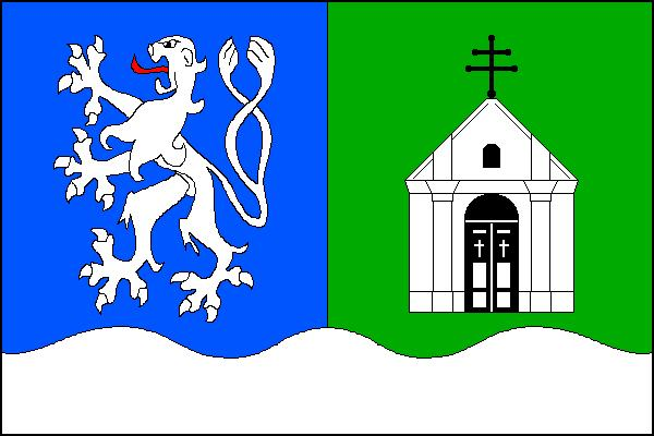 Vlajka obce Velká Jesenice